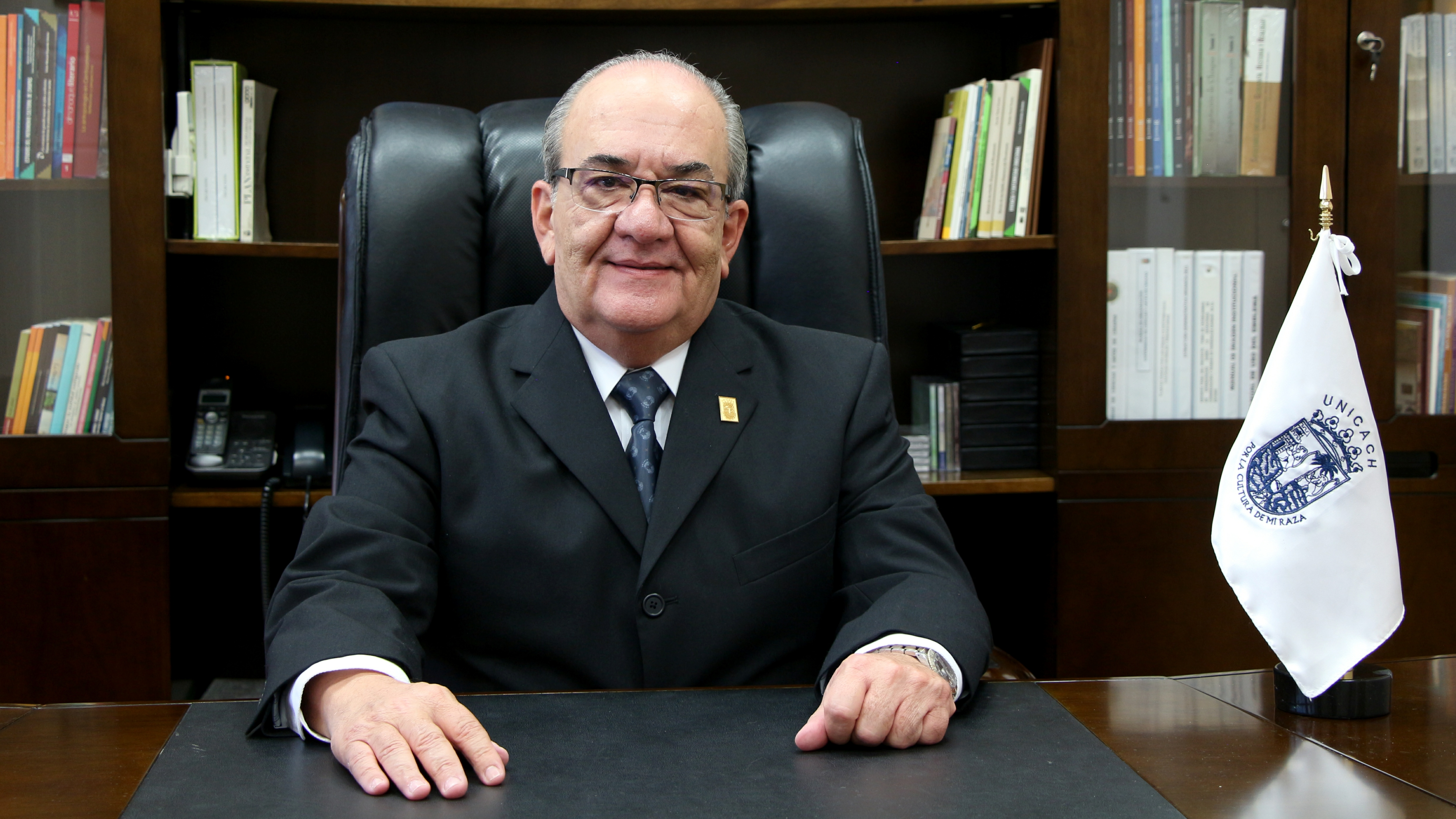 Rector de la Universidad de Ciencias y Artes de Chiapas